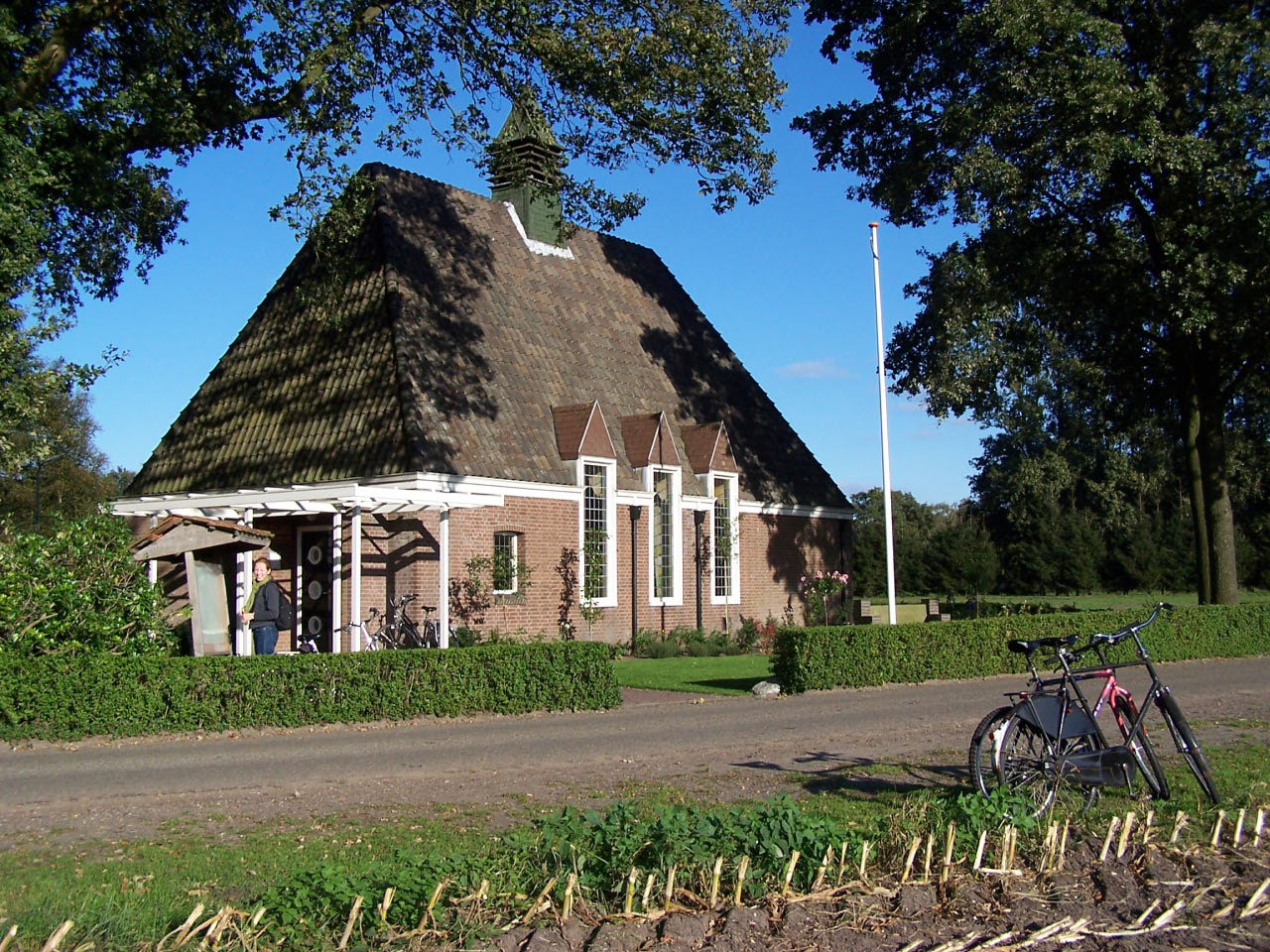 Picture of Johanneskerk in Twekkelo, Enschede, Netherlands